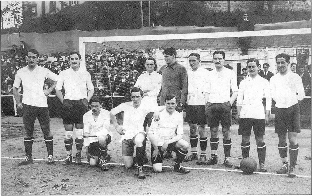 Plantilla del Athletic Club de 1914